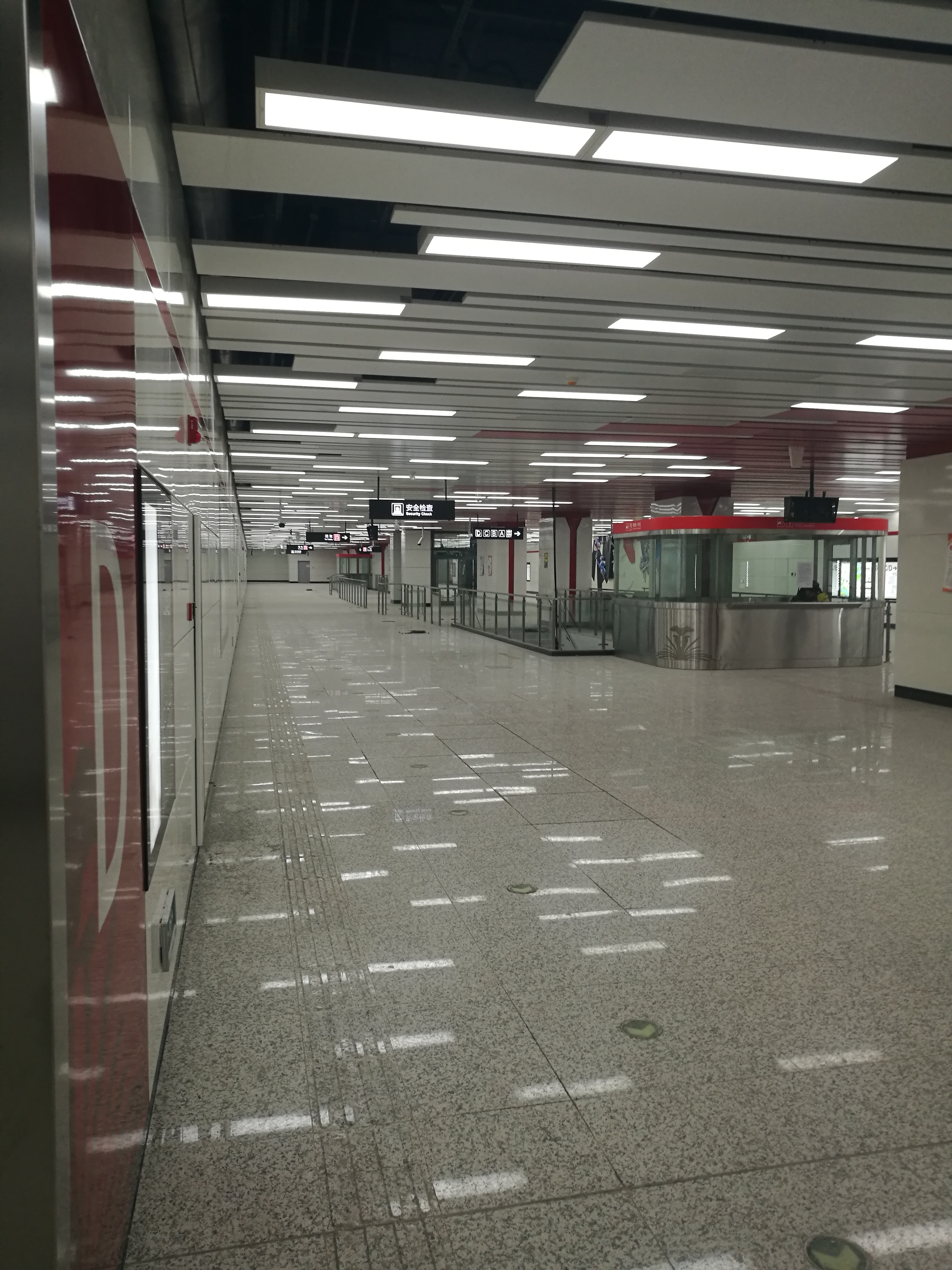 南环城路站站厅